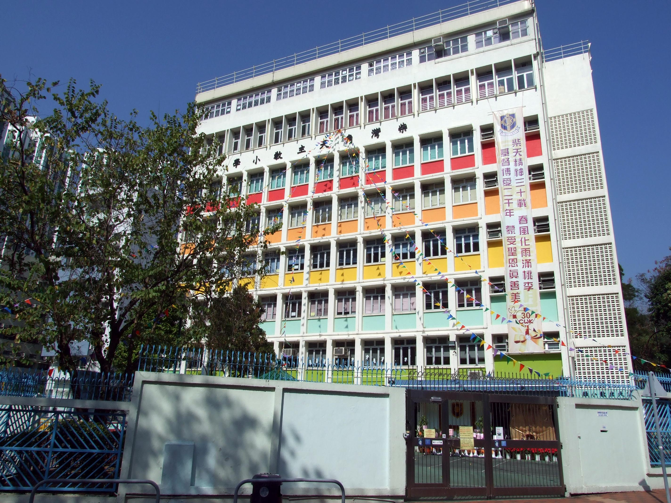 中文（香港）: 柴灣角天主教小學